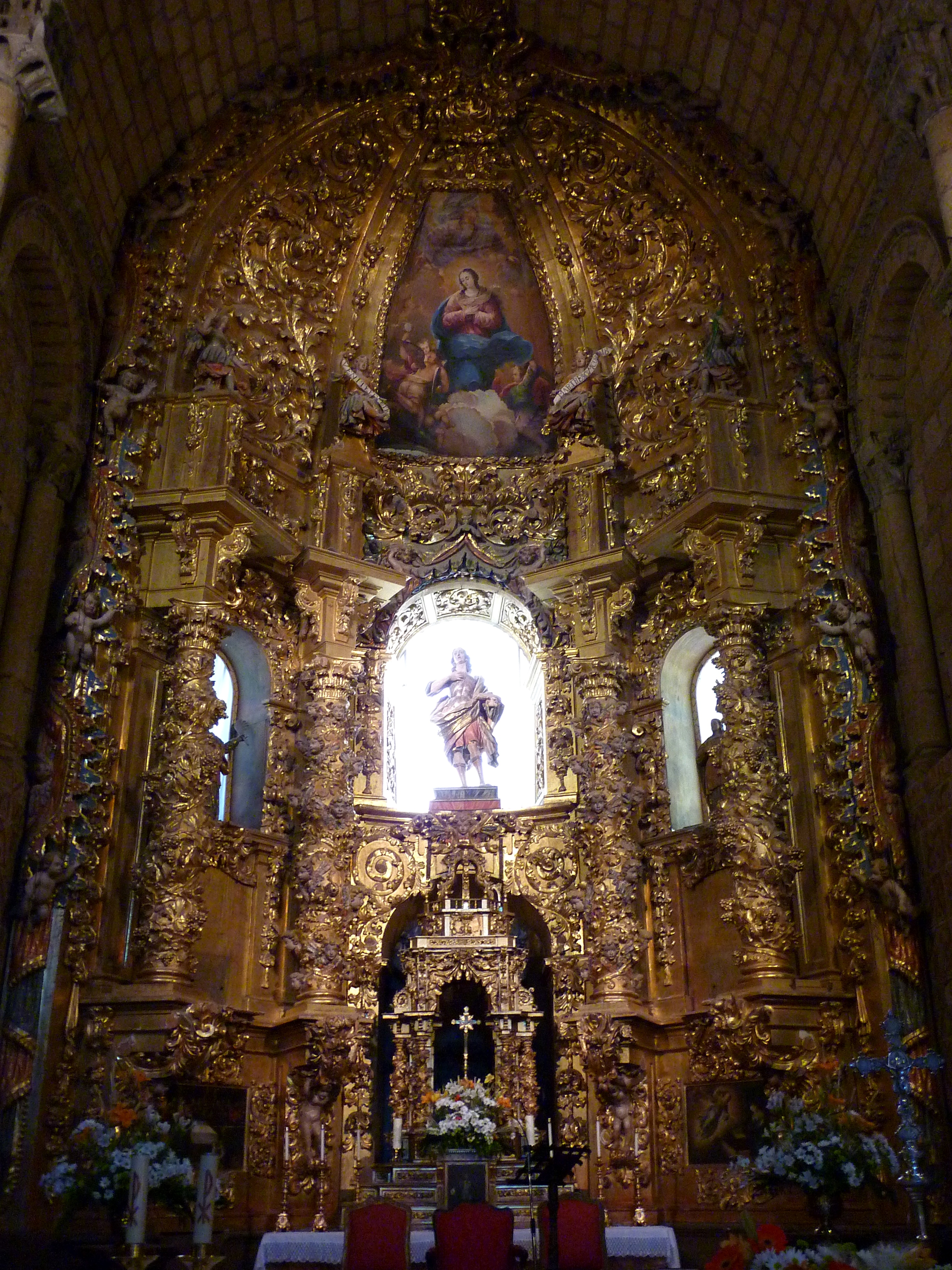 Altar mayor de la basílica de San Vicente (Ávila).